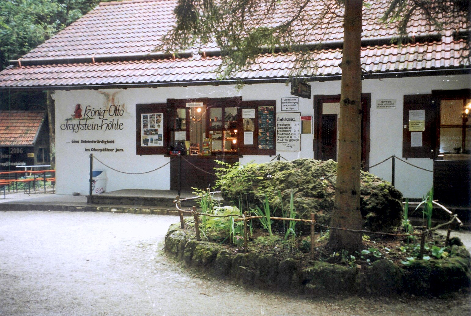 König-Otto-Tropfsteinhöhle, Germany